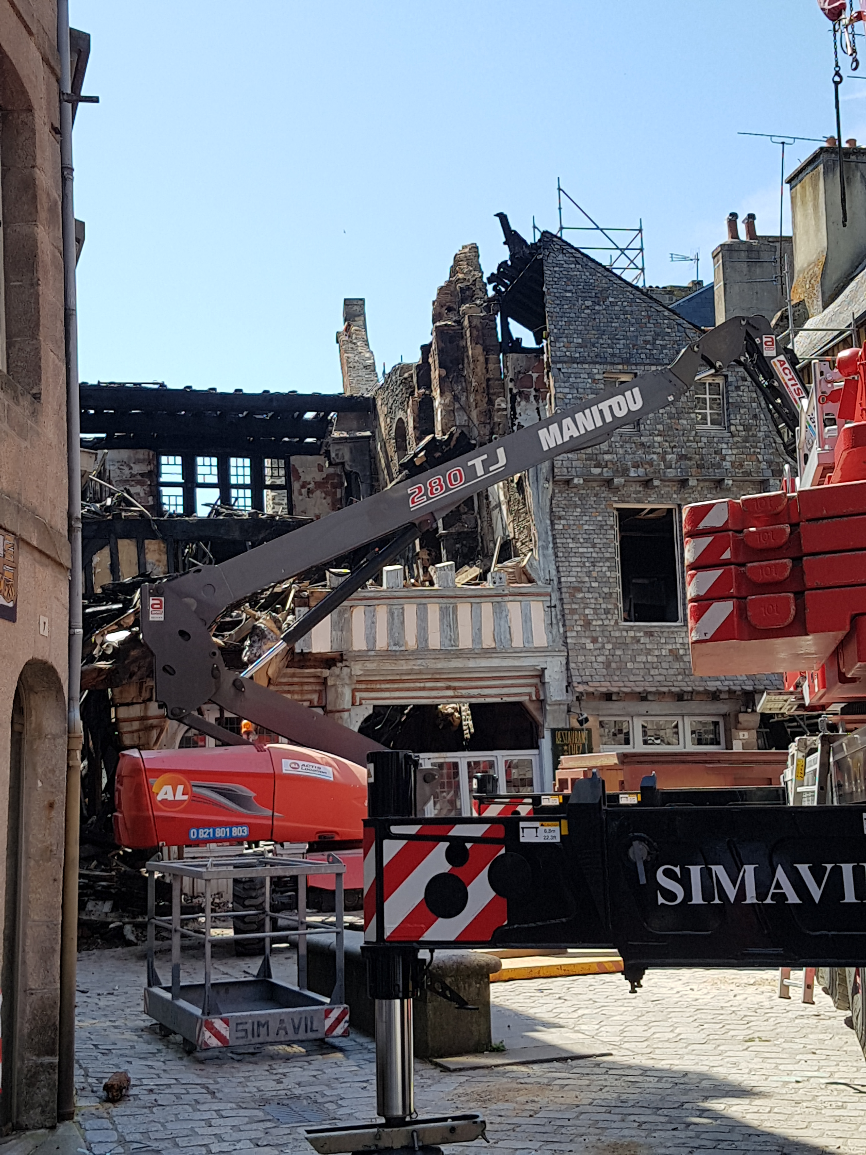 déblaiement en cours sur la maison de la mère Pourcel à Dinan, 6 juillet 2019